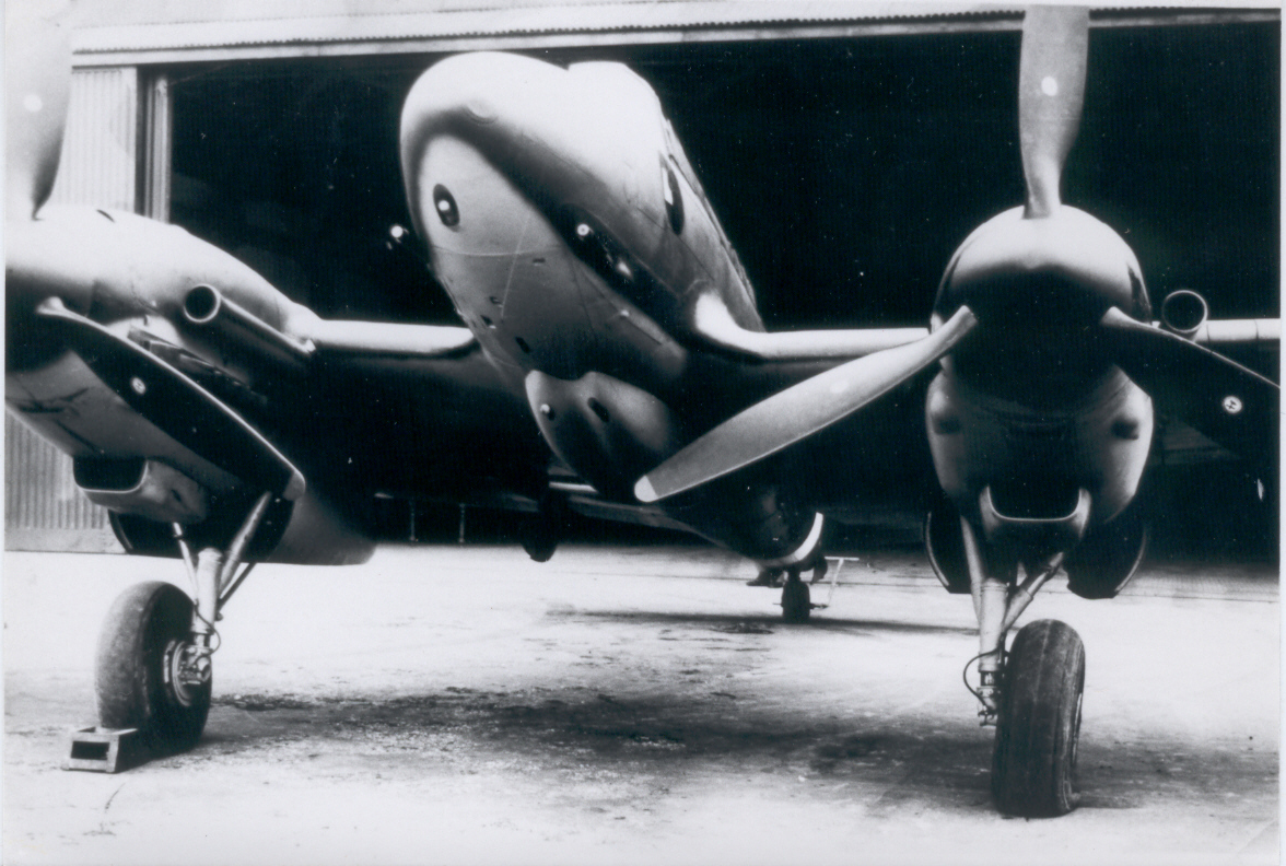 Foto dell'IMAM Ro.58